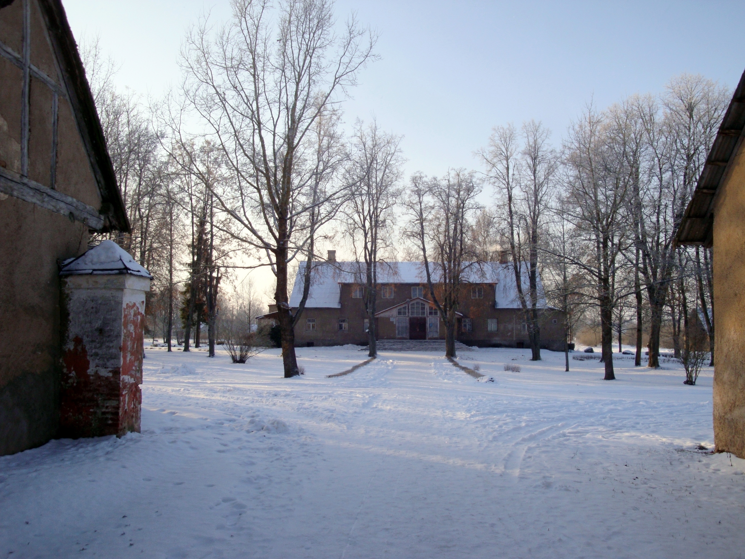 Bukaiši (Fockenhof) manor